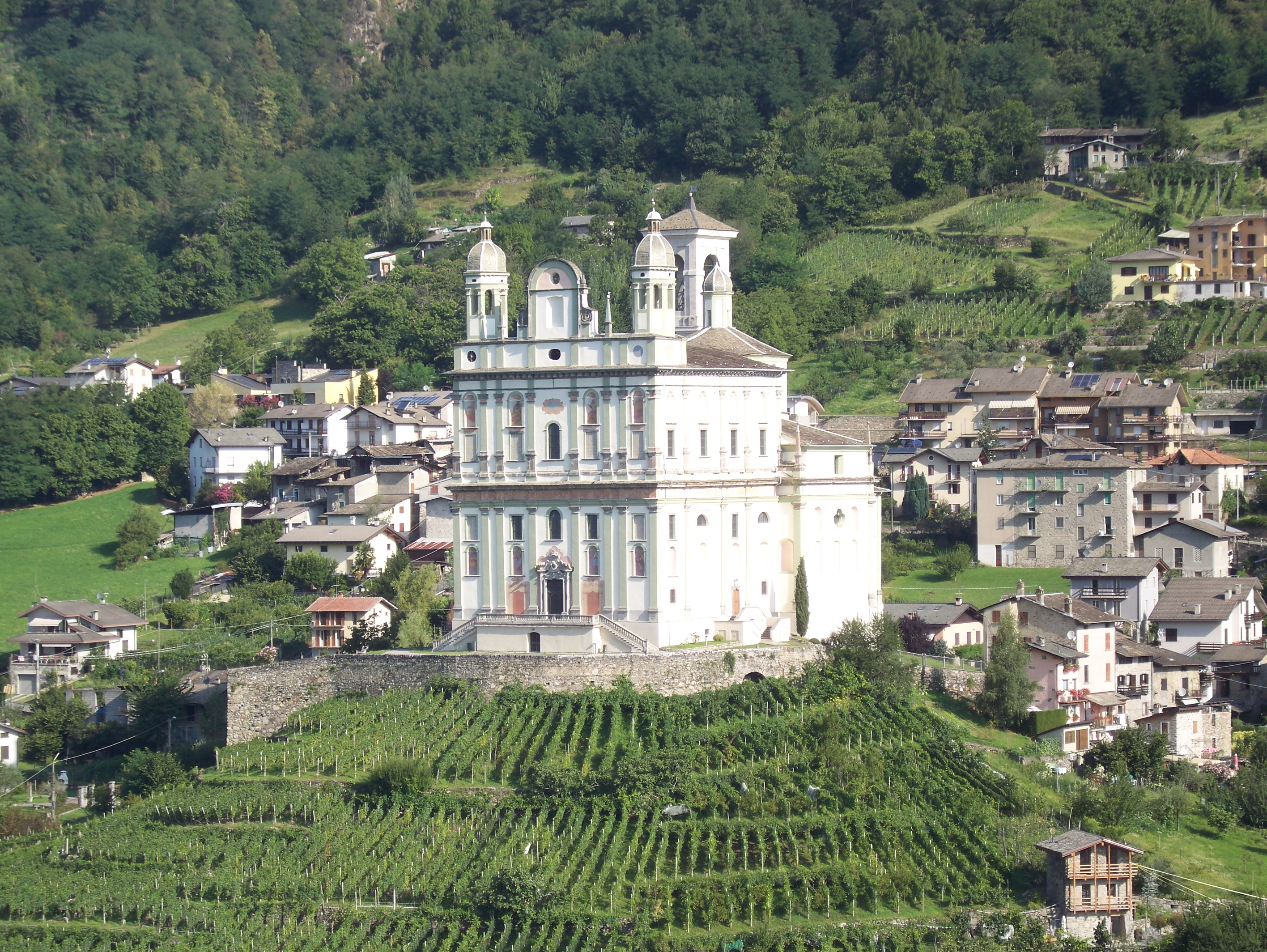 Santuario della Santa Casa, Tresivio